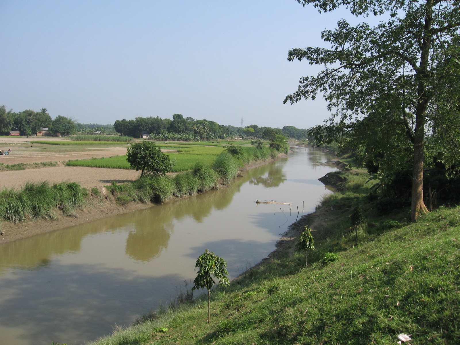 Korotoa River at Mahasthangarh, Bogra, Bangladesh